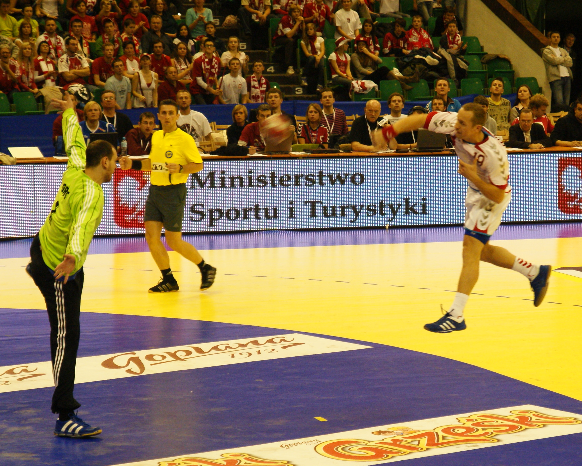 Tomasz Tłuczyński Mecz Polska - Rosja, Turniej Reprezentacji Narodowych Mężczyzn w Piłce Ręcznej, Hala widowiskowo-sportowa Arena, Poznań, Polska.